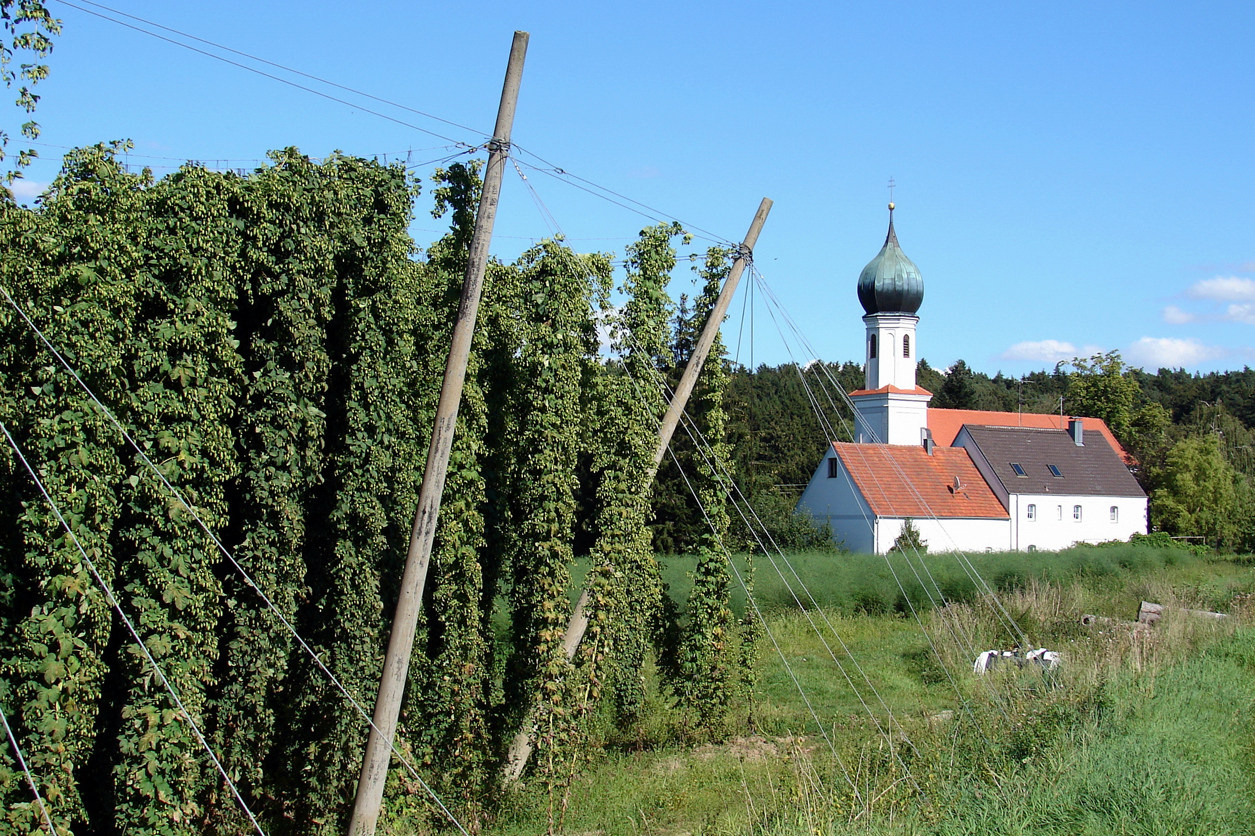 Lohwinden ist ein Dorf im oberbayerischen Markt Wolnzach. Der kleine Ort besteht aus zwei landwirtschaftlichen Anwesen, normalen Wohngebäuden, der Wallfahrtskirche und einem Dorfweiher. Die Entfernung zum Bahnhof Rohrbach beträgt einen Kilometer, zum Wolnzacher Marktplatz sind es zwei Kilometer. Da der Charakter des Ortes erhalten bleiben soll, ist es nur in Ausnahmefällen möglich, dort zu bauen.